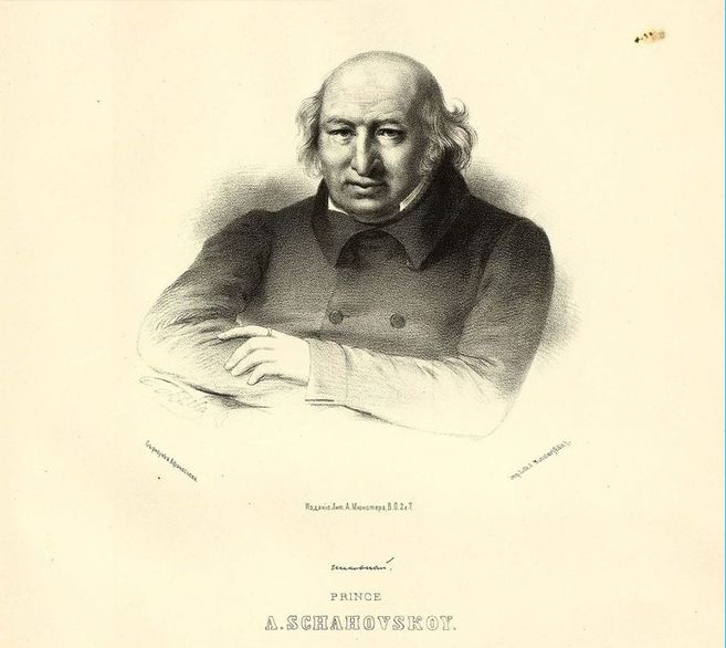 PRINCE A. SCHAHOVSKOY. Съ рисунка Афанасьева. Лит. А. Мюнстера, СПБ. Imp. Lith. A. Munster (Editeur)